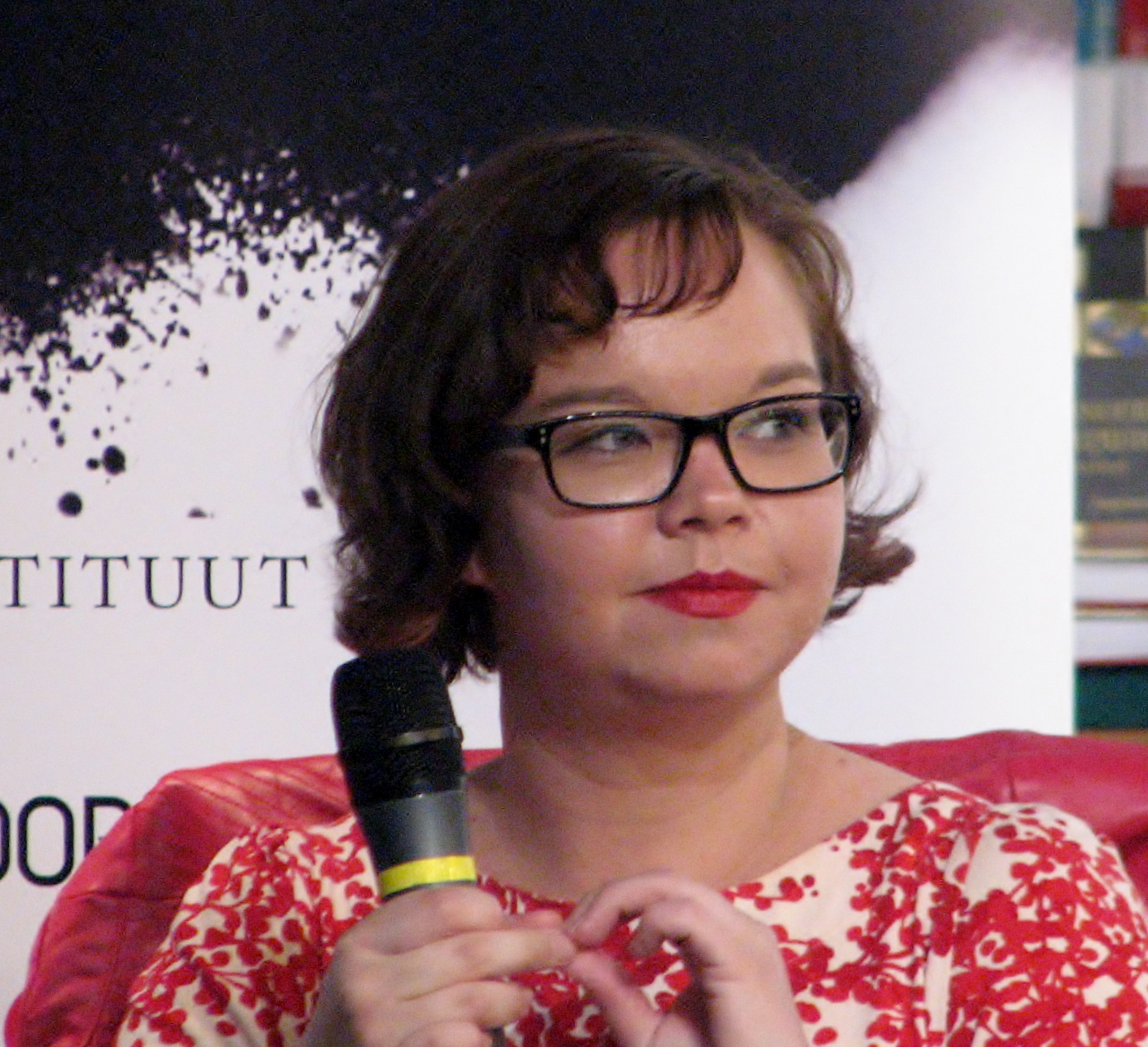 Salla Simukka Viru keskuse Rahva Raamatus Prima Vista raames